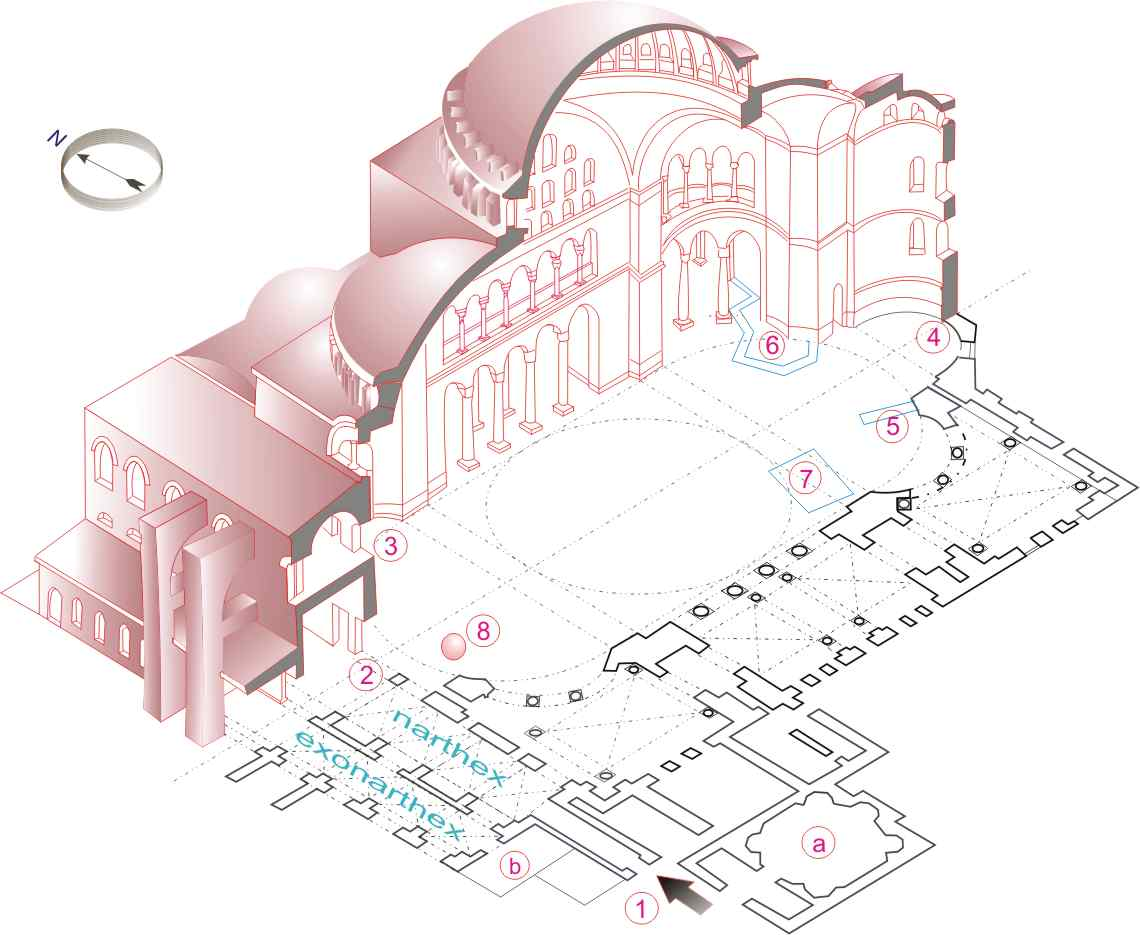 Hagia Sophia metszeti képe 1. Entrance (Bejárat) 2. Imperial Gate (Császár-kapu) 3. Perspiring column (Izzadó-oszlop) 4. Mihrab 5. Minbar 6. Sultan's prayers place (Rácsos imahely a szultán részére) 7 Omphalos – "Navel of World" ( Omphalos, a „világ köldöke”) 8. Lustration urns (Víztartó vázák) a.) Tomb of Mustafa I. (Bizánc-kori keresztelőkápolna, majd I. Musztafa sírja) b.) Minars of Selim II. (II. Szelim szultán minaretjei)